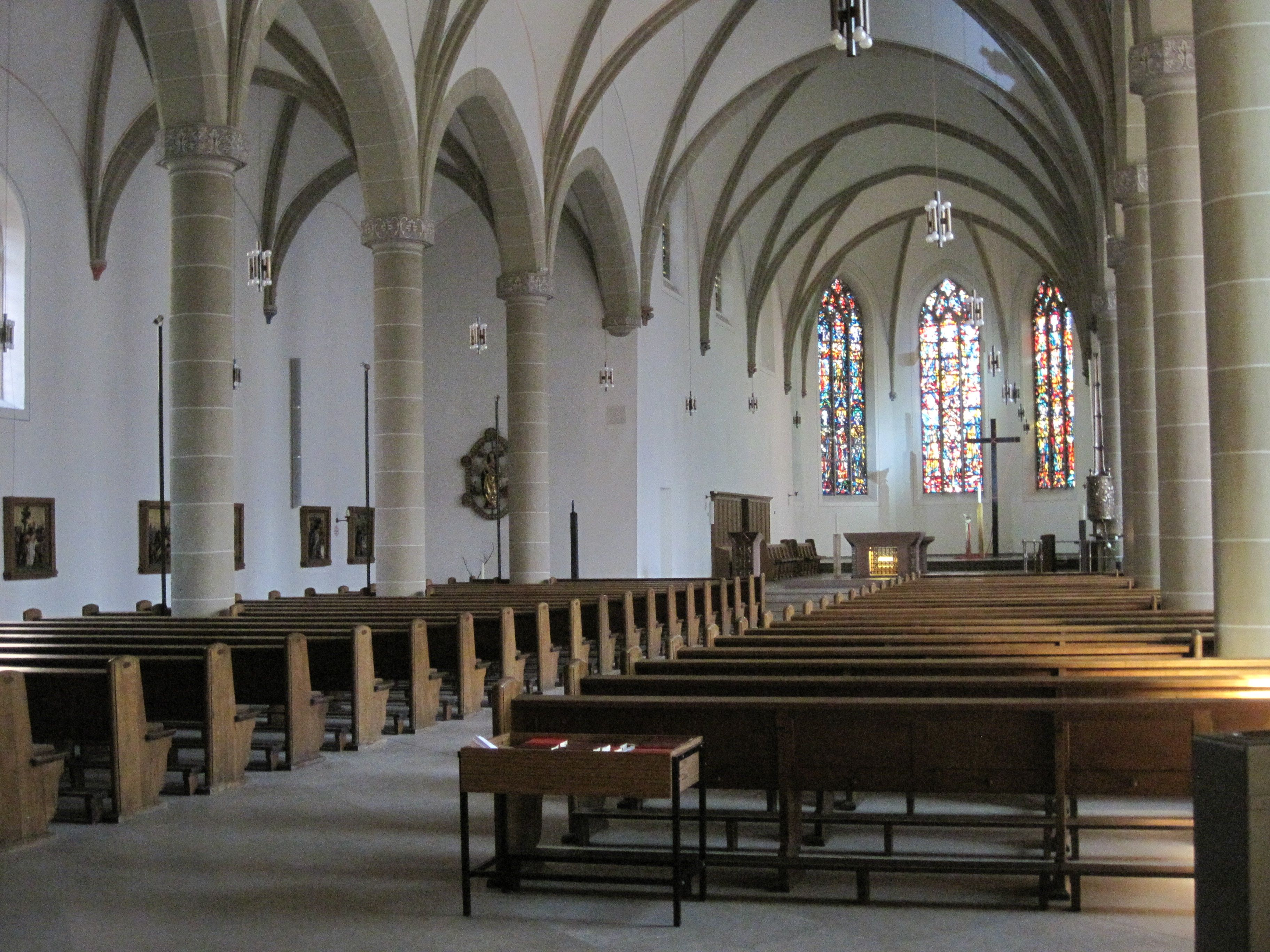 Das Foto zeigt den Innenraum der St. Agnes-Kirche in Hamm.